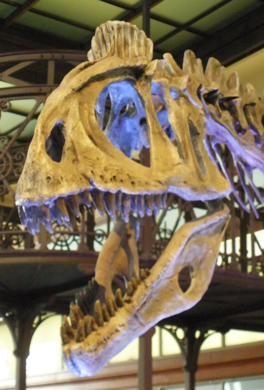 Fossil of Cryolophosaurus, a theropod dinosaur Took the photo at Musee d'Histoire Naturelle, Brussels